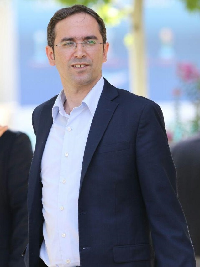 گزارش تصویری از مراسم معارفه و نشست خبری آندره‌آ استراماچونی در تیم استقلال